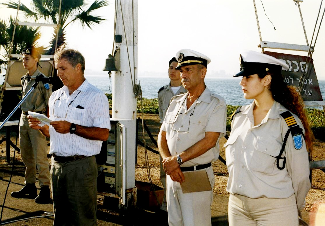 מנהל בית הספר אלי רגב המדריך הותיק מיכה סלק והקדטית ענת גקמן במסדר בוקר 1997